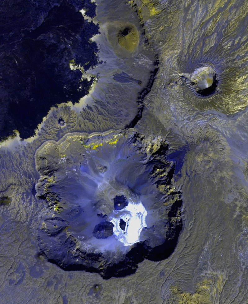 Le Trou au Natron du Toussidé, vue satellite par TerraLook ASTER (date 2006-01-20)